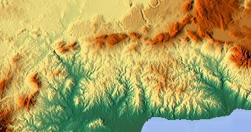 Topografía de la Cordillera Anteuqerana (Málaga)